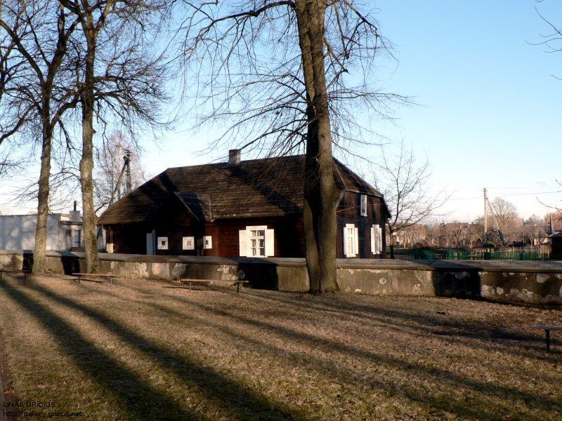 Simonas Daukantas memorial museum in Papilė, Lithuania